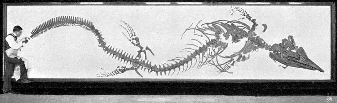 Complete skeleton of Tylosaurus dyspelor.